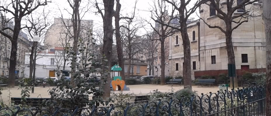 Square Gerbert, Paris 15ème